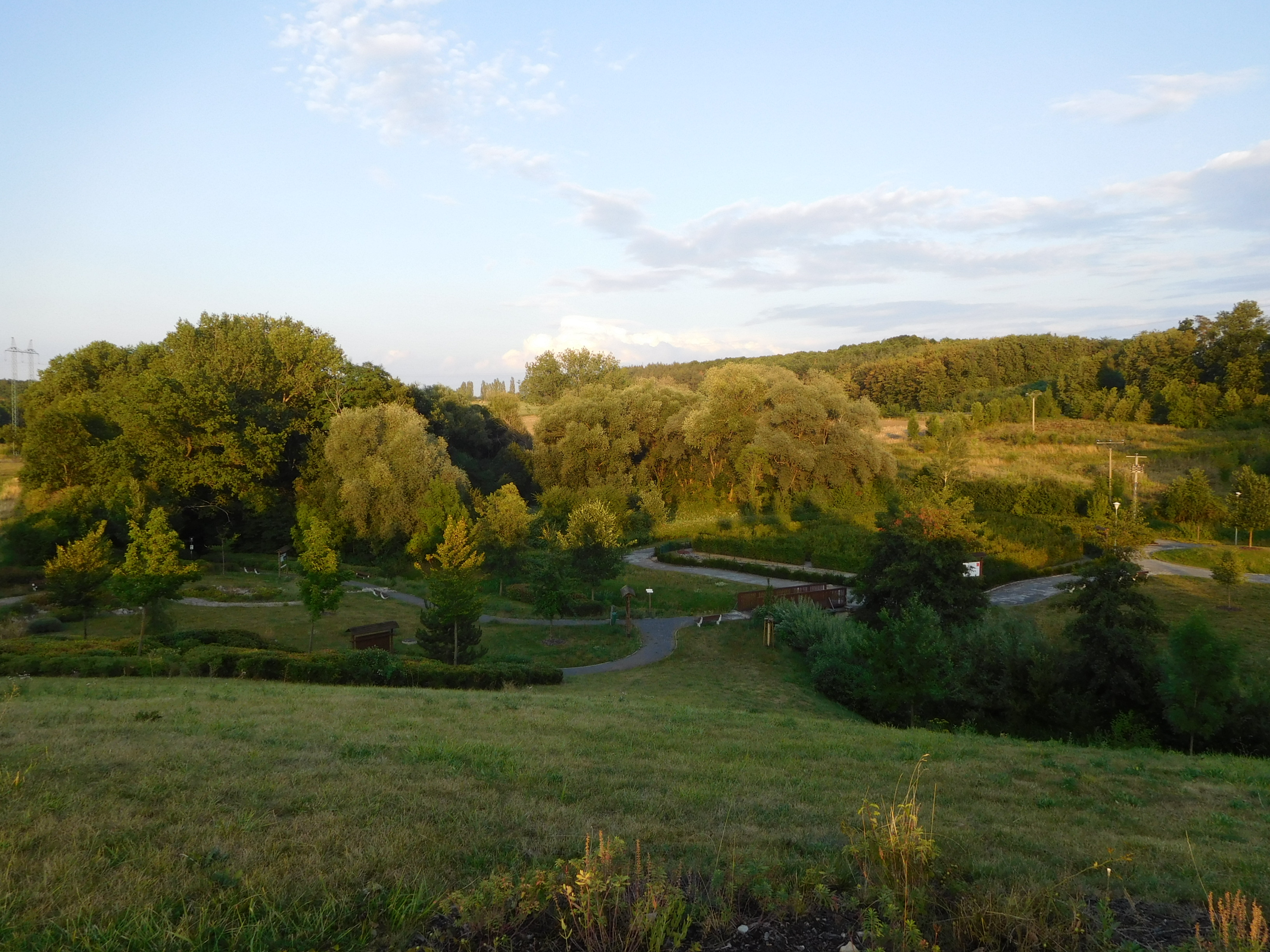 Praha - Dubeč, Panská zahrada z vyhlídky